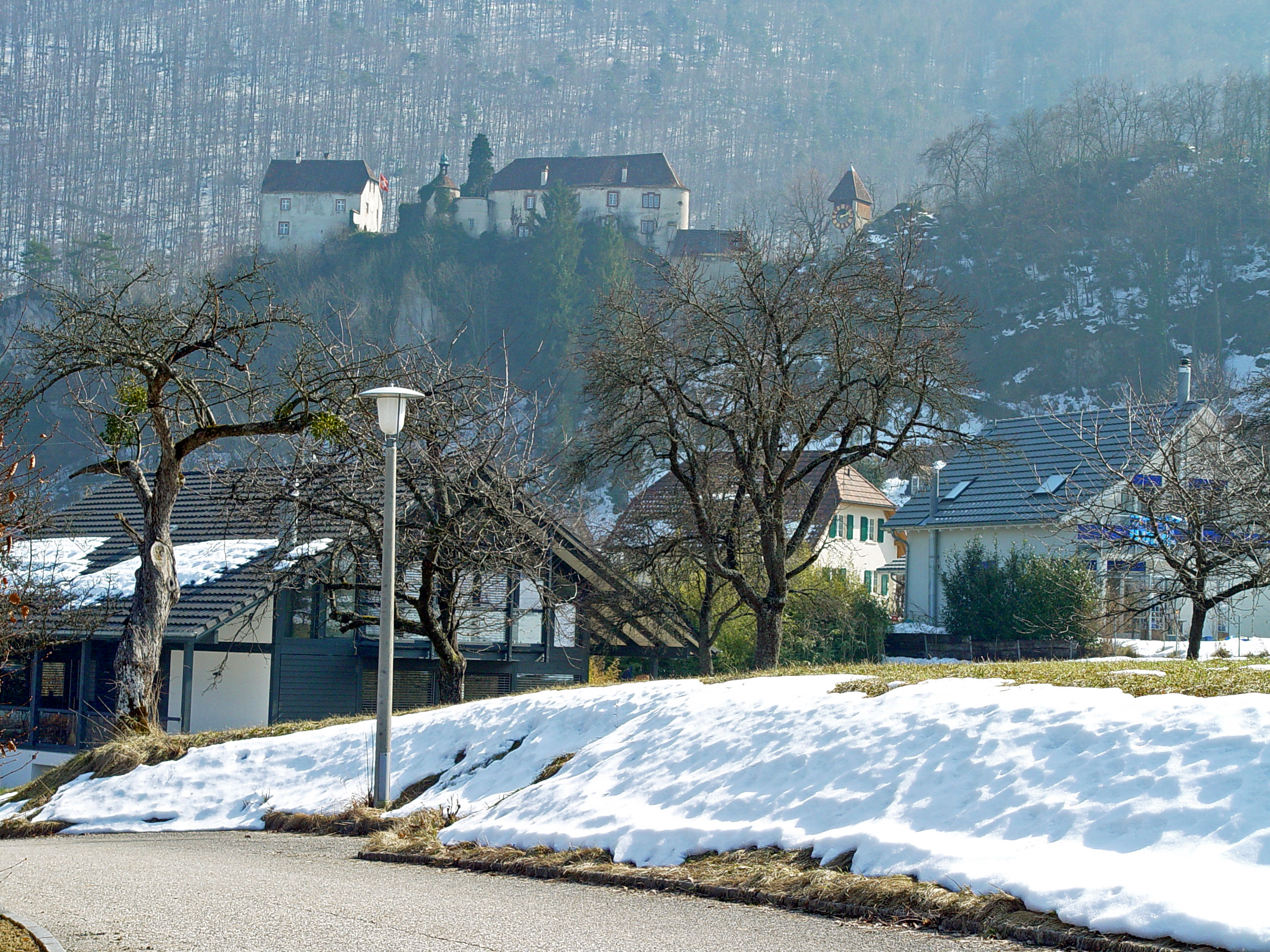 Sicht auf Burg im Leimental von unten beim schönen Wetter.